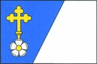 Dobrkovice, vlajka. List šikmo dělený na modré a bílé pole, na horním okraji listu v poměru 2 : 1, na dolním okraji v poměru 1 : 2. V modrém poli bílá růže se žlutým semeníkem, z ní vyniká žlutý jetelovitě zakončený procesní kříž. Poměr šířky k délce listu je 2 : 3.